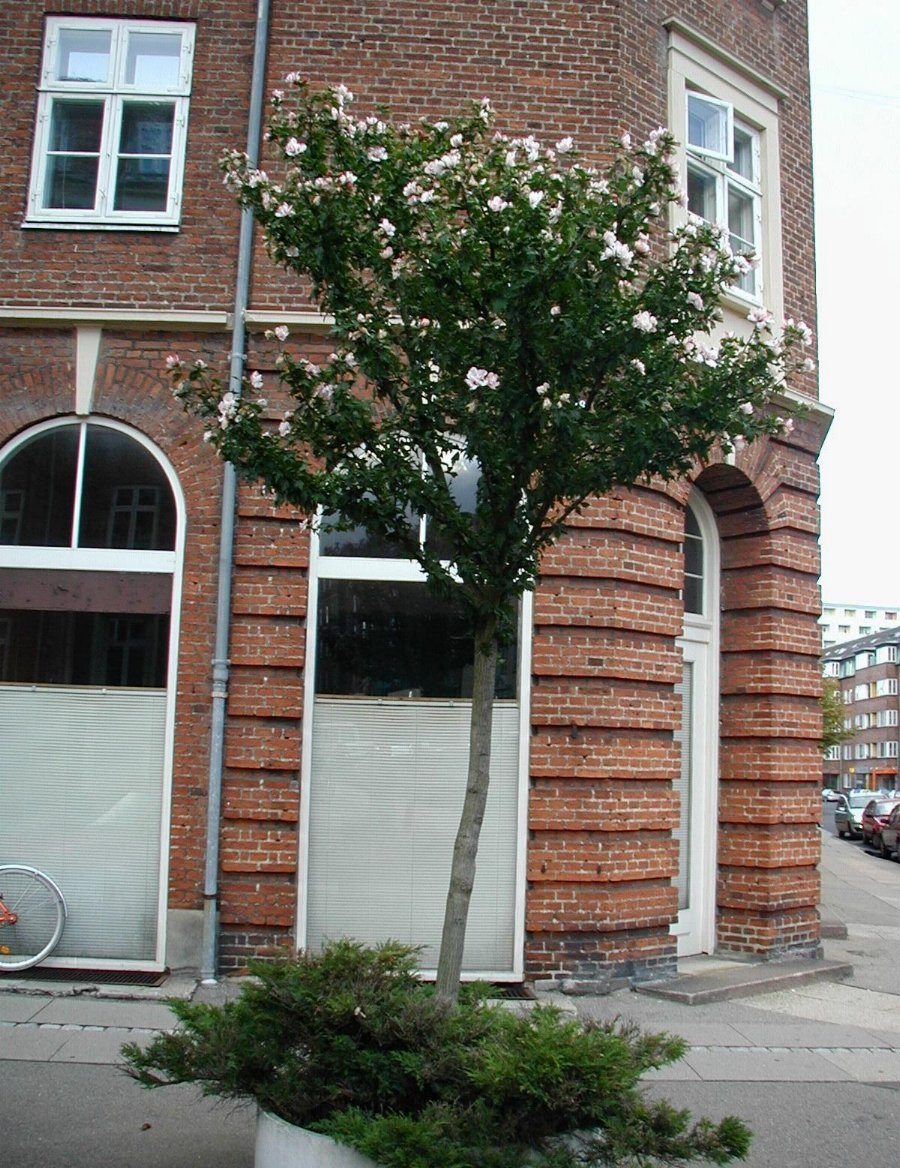 Hibiscus syriacus as a street tree in Copenhagen. Taken in Copenhagen, August 2003.